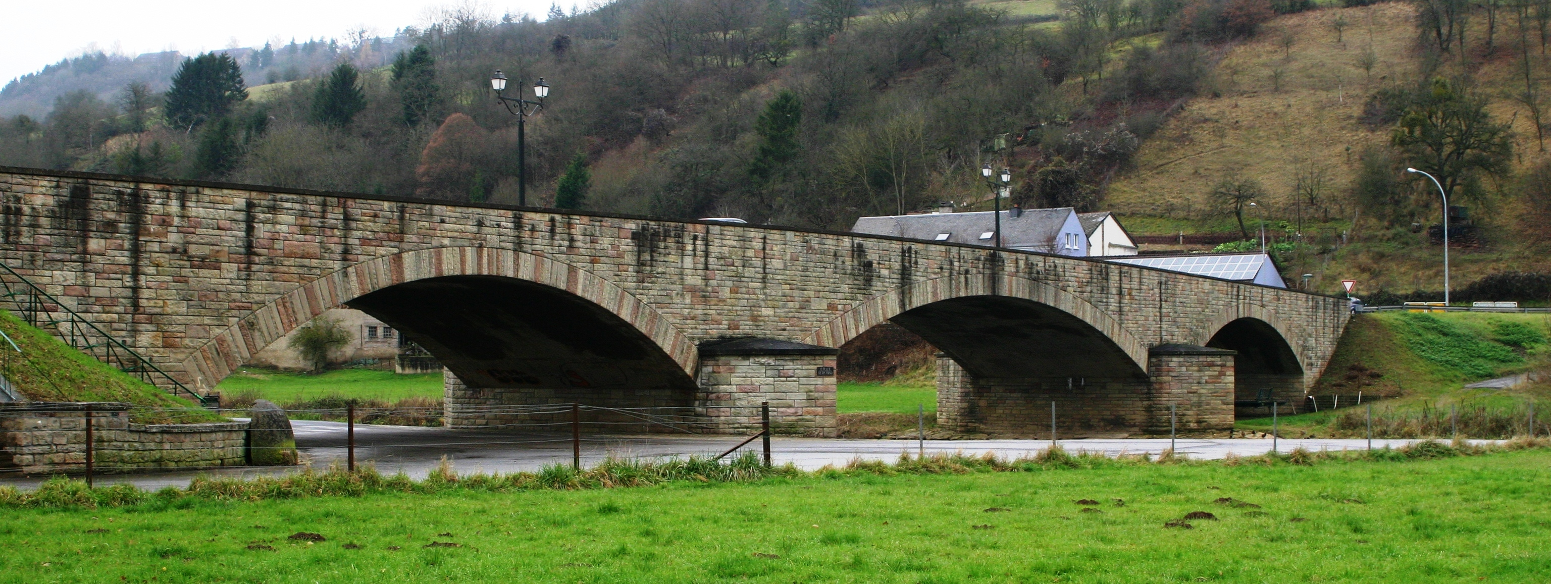 D'Sauerbréck zu Gilsdref vum rietsen Uwänner gesinn. Kategorie:Brécken zu Lëtzebuerg Gilsdref Gilsdref Kategorie:Kanton Dikrech